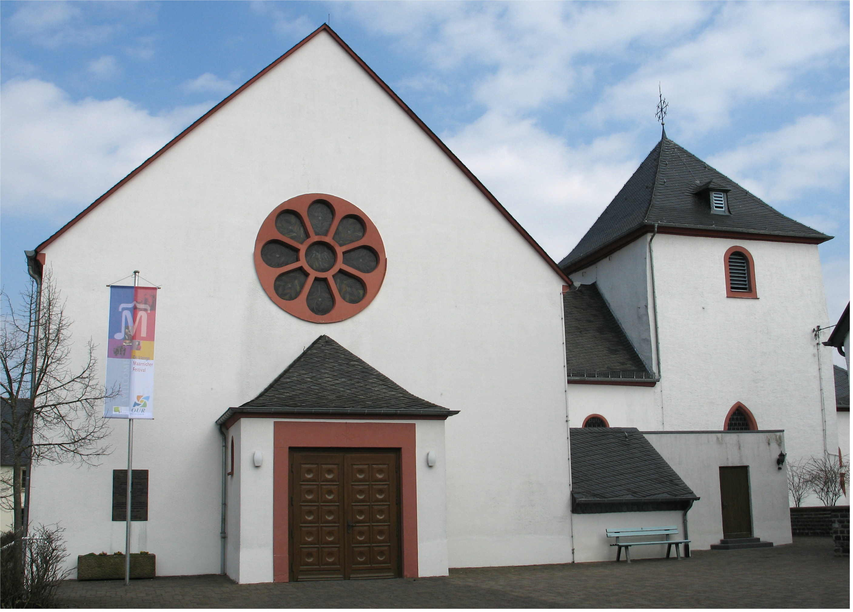 Kierch vun Dahnen.